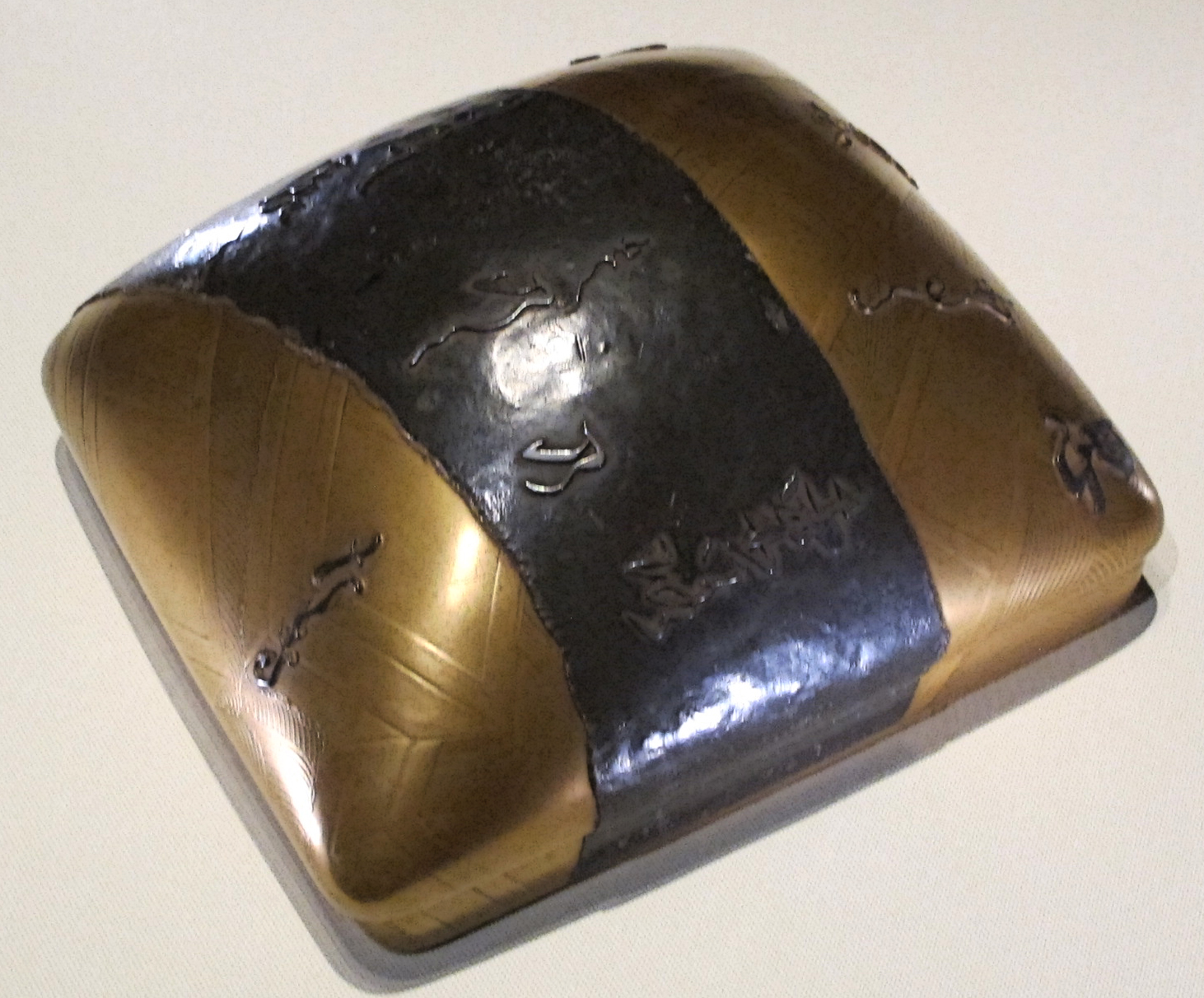 Periodo edo, scatola per scrittura, di hon'ami koetsu, XVII sec